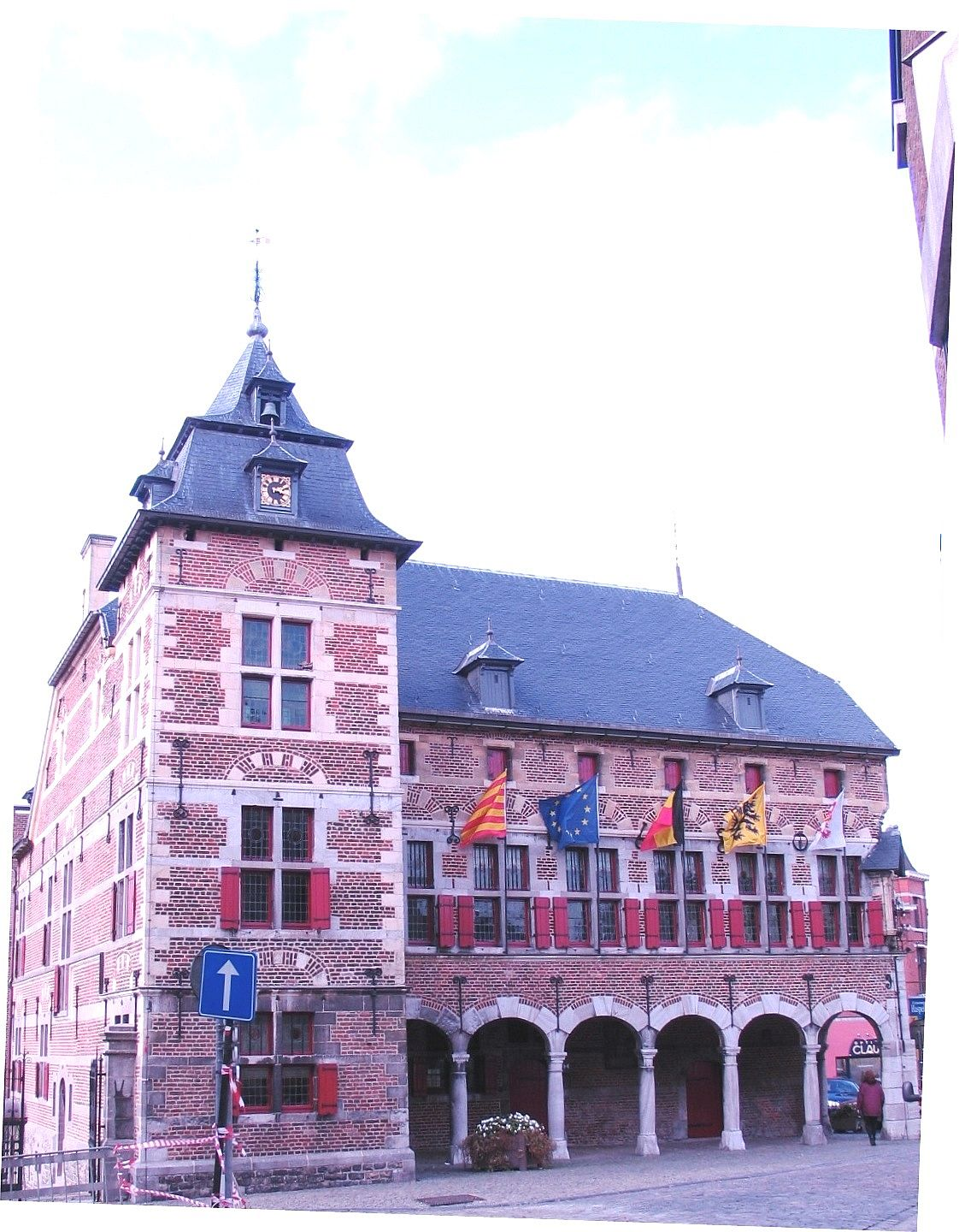 Grevenhuis in Borgloon